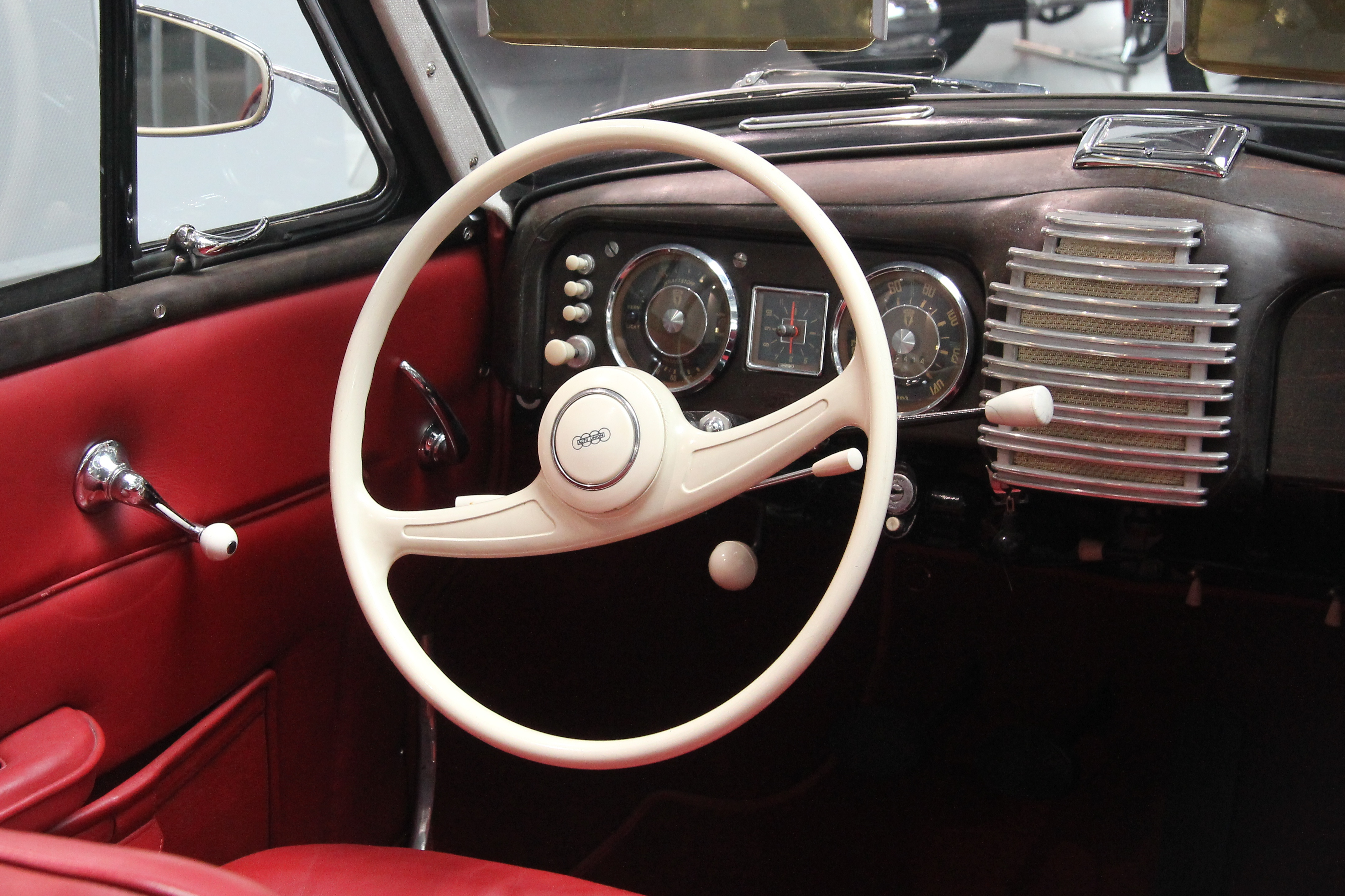 DKW Sonderklasse, Typ F 91, Cabriolet von Karmann, Baujahr 1953, im museum mobile in Ingolstadt. 3-Zylinder-Zweitaktmotor, 896 cm³, 34 PS bei 4000/min, Höchstgeschwindigkeit 115 km/h, Verbrauch: 9 l/100 km. 432 Stück wurden gebaut.